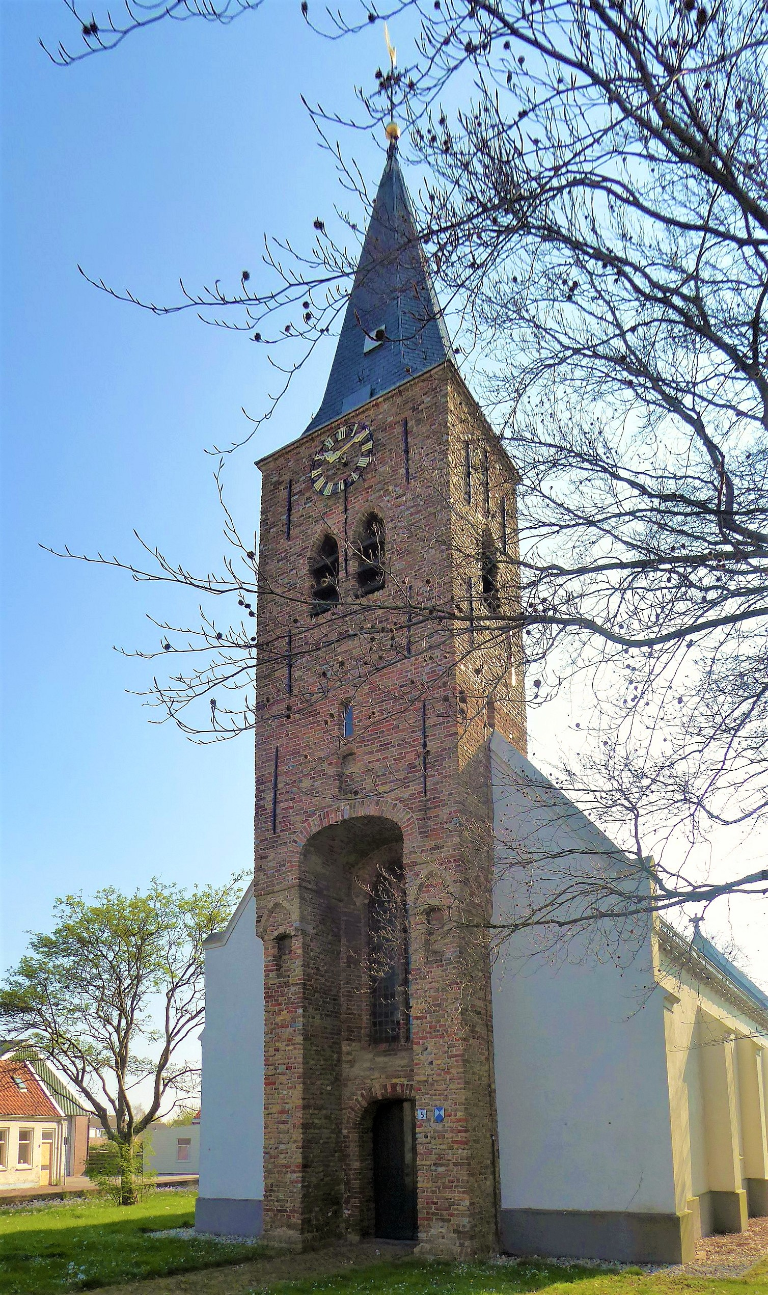 Sint Petrus en Pauluskerk (Ovezande)